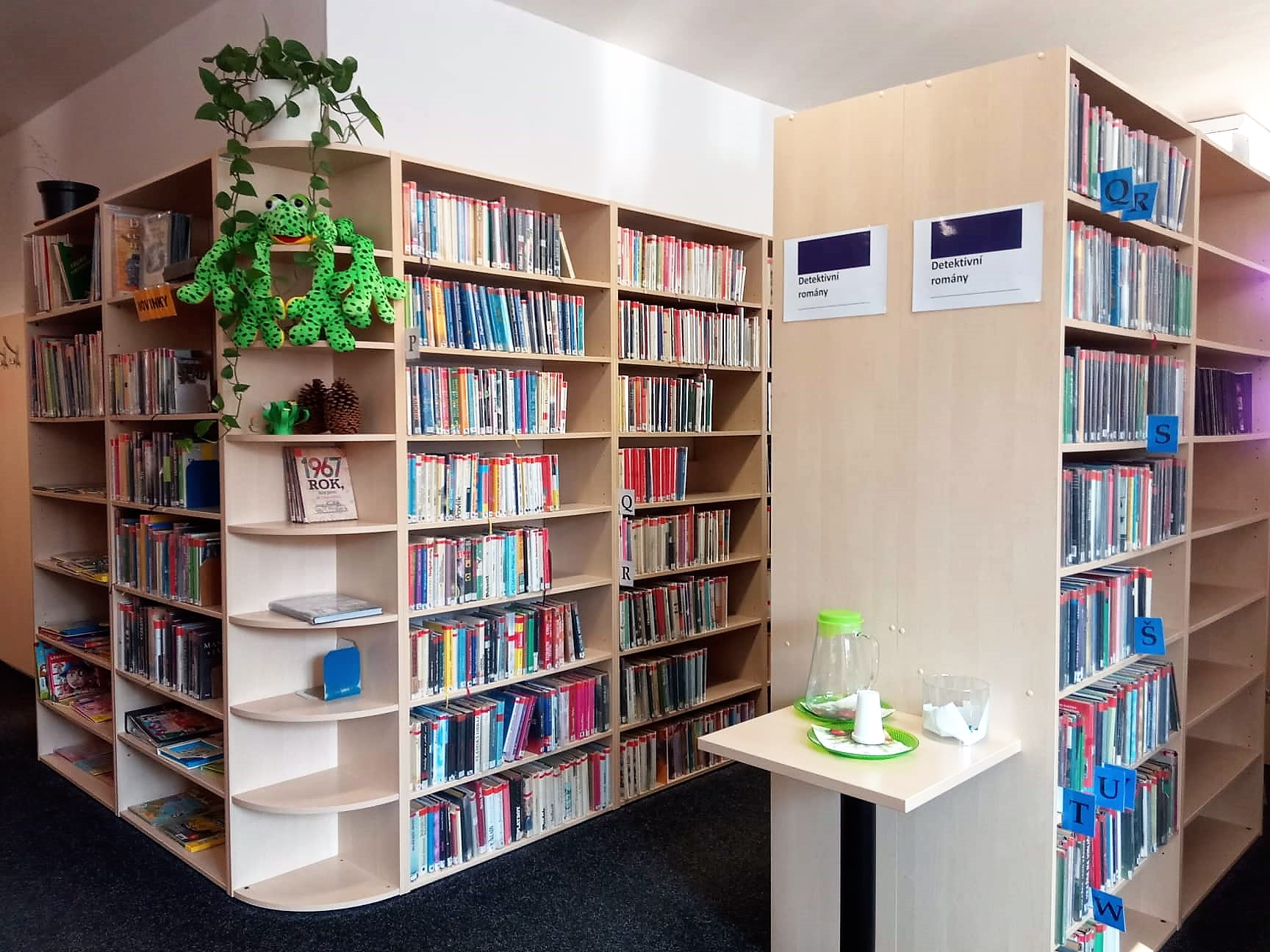 Knihovna Dubina interiér